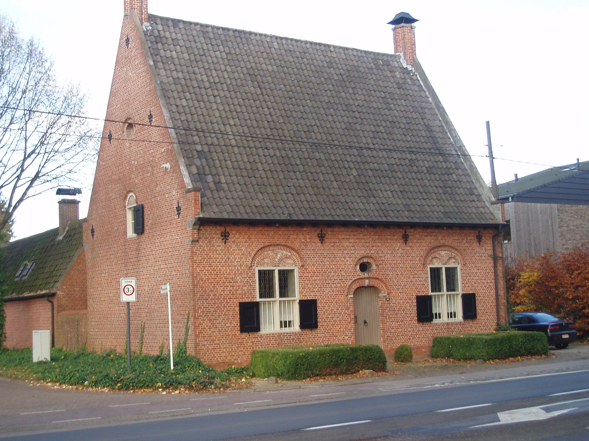 Hoekhuis Antwerpsesteenweg 58 Oostmalle